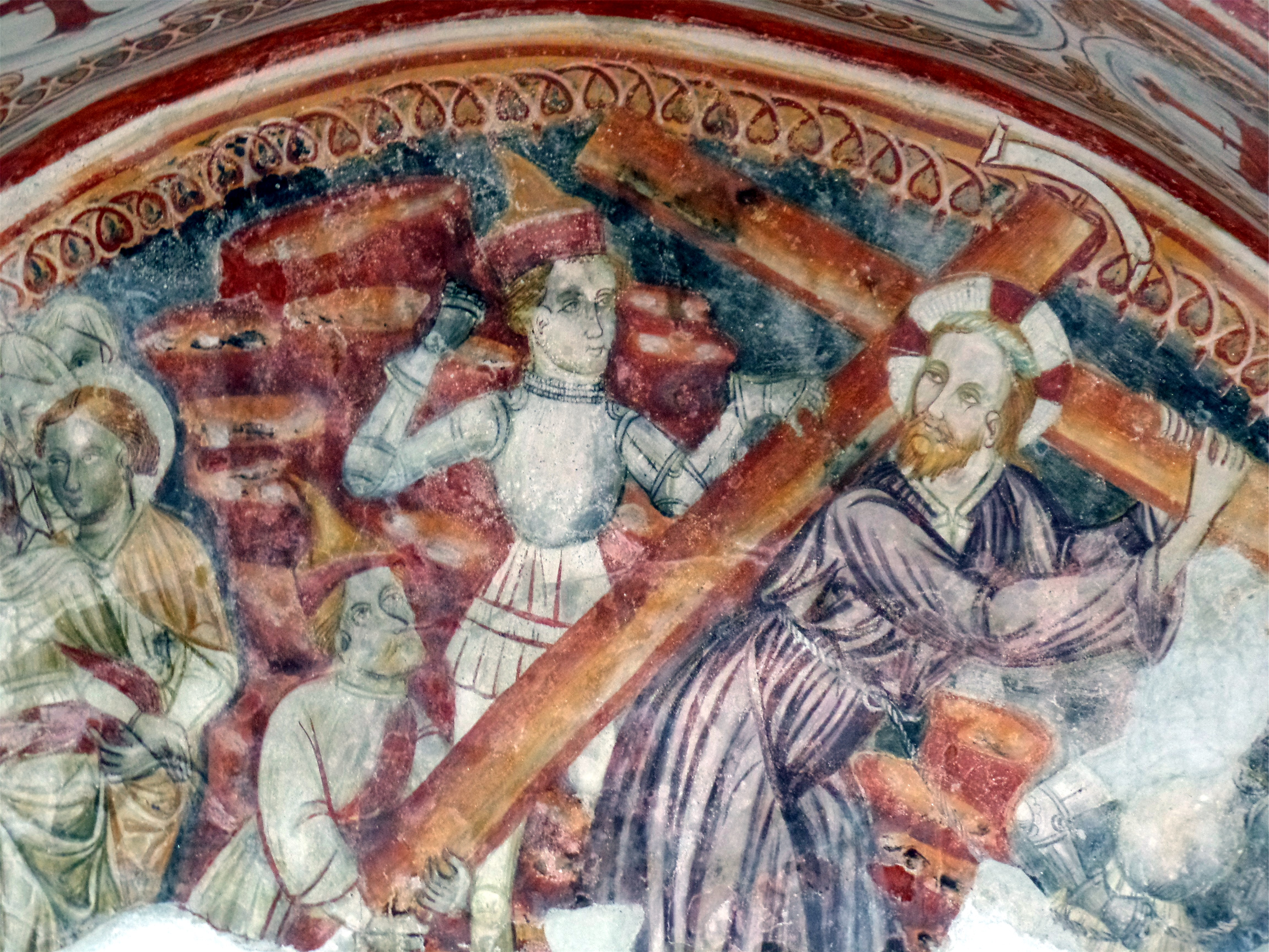 Ausschnitt von der Freskenmalerei in St. Nikolaus